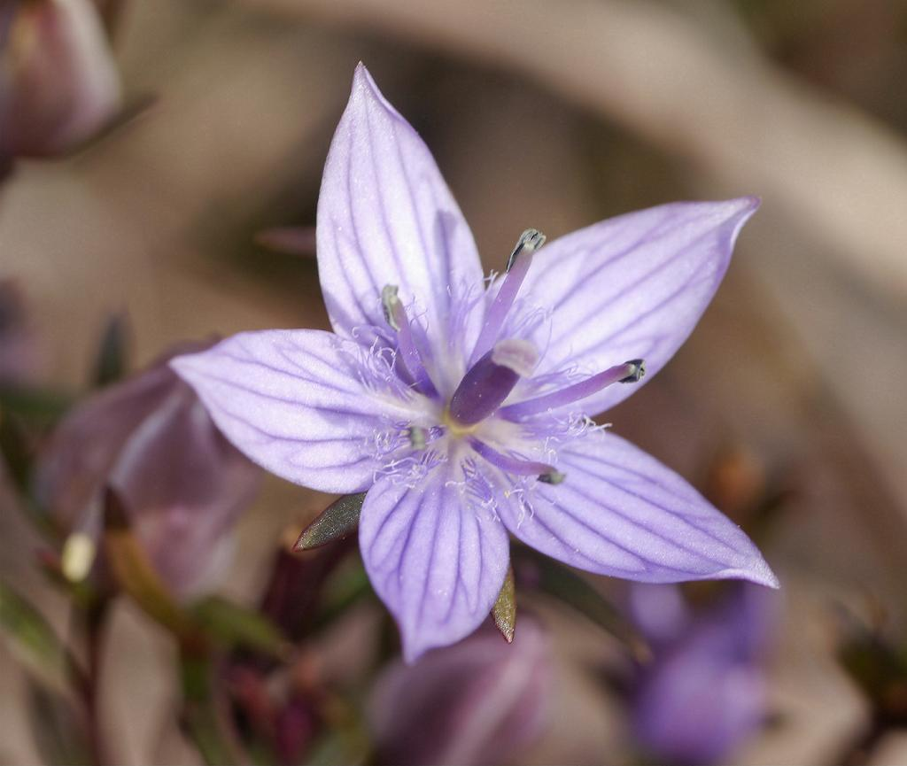 Swertia pseudochinensis：ムラサキセンブリ 2016/11/13 生石山（和歌山県）：Mount Oisi(Wakayama Pref,)